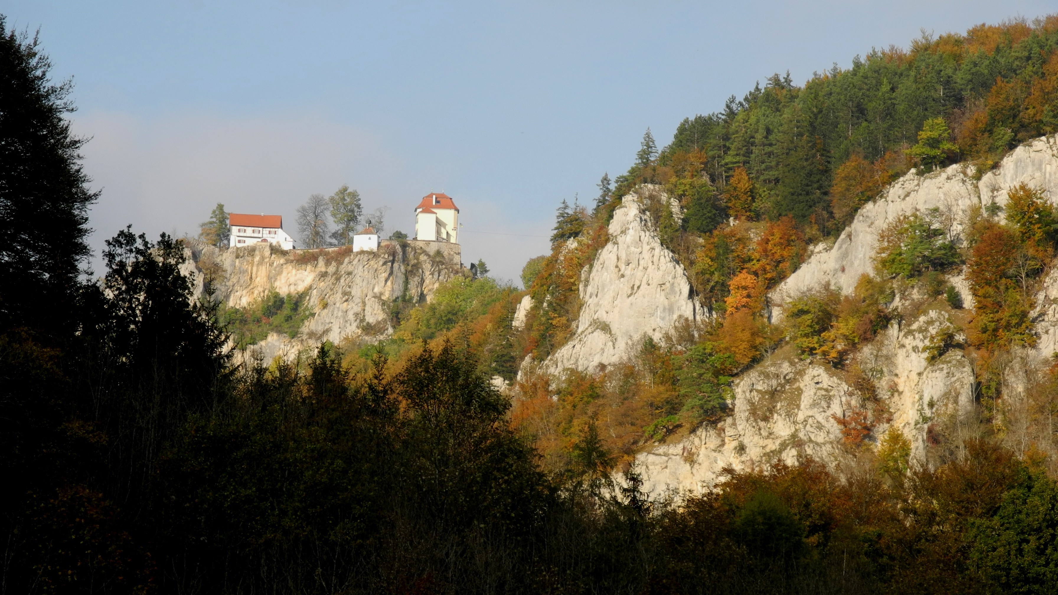 Schloss Bronnen über der Donau mit Felsenlandschaft